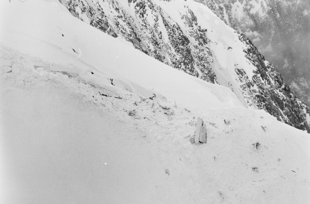 エア・インディア101便は1966年1月24日にモンブランに墜落し、乗員乗客117人全員が死亡した。